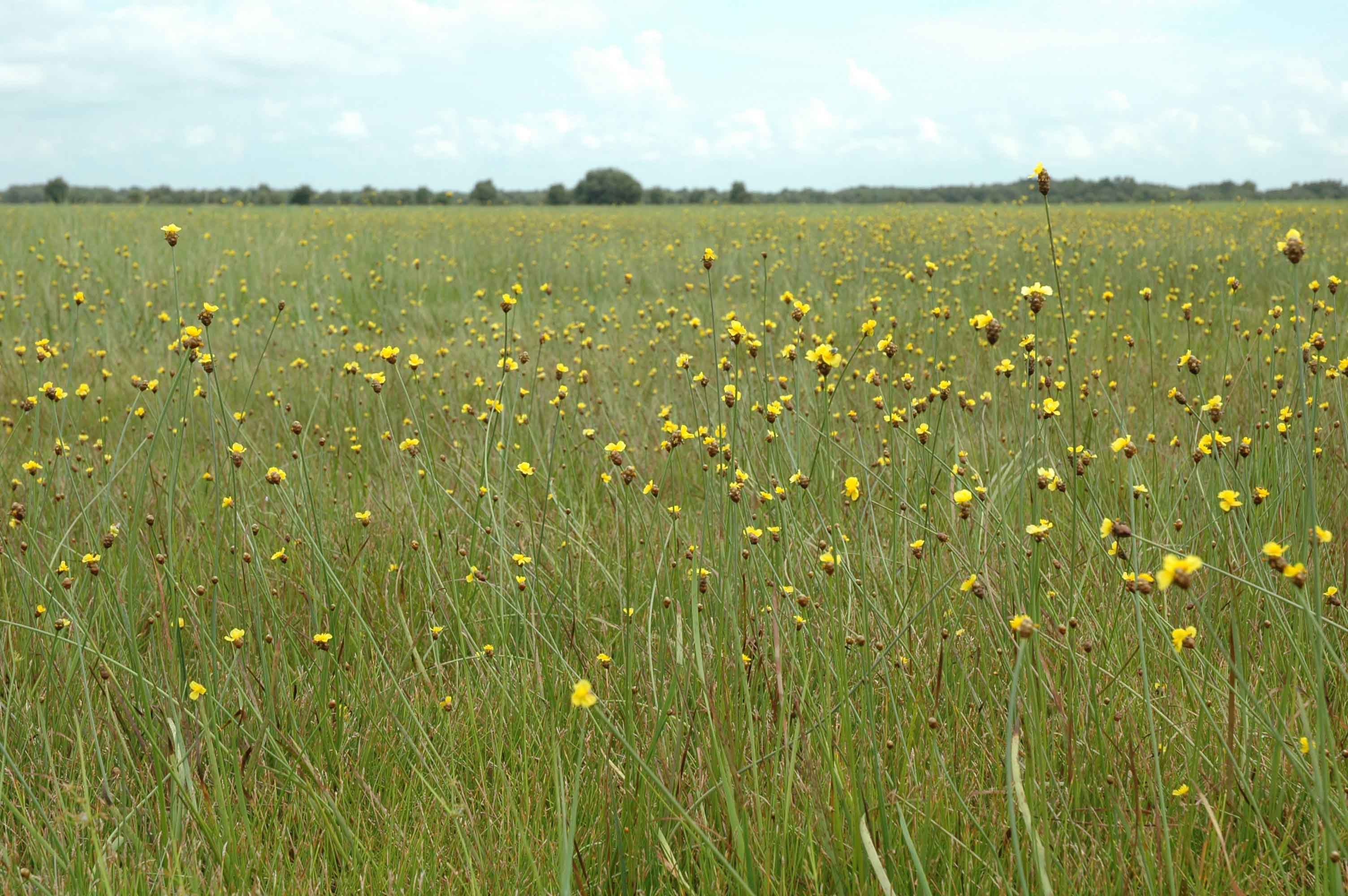 Hoàng Đầu Ấn